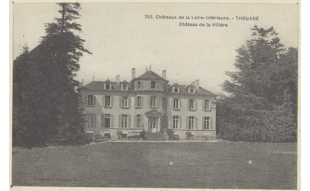 Thouaré - Château de la Hillière